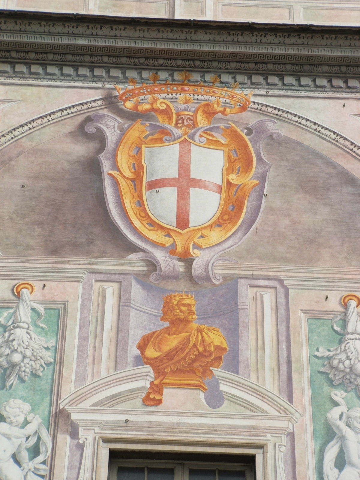 detail